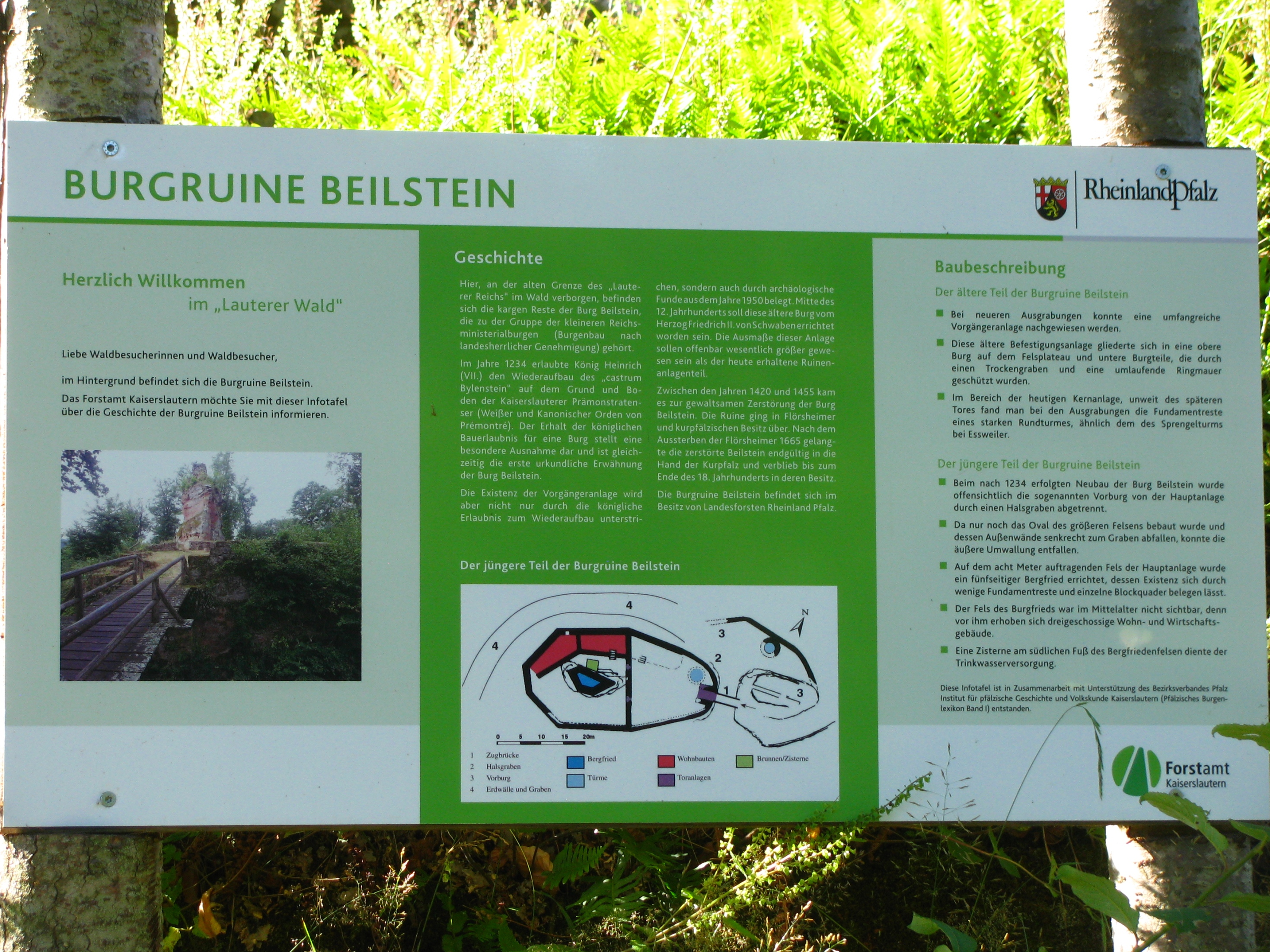 Informationstafel